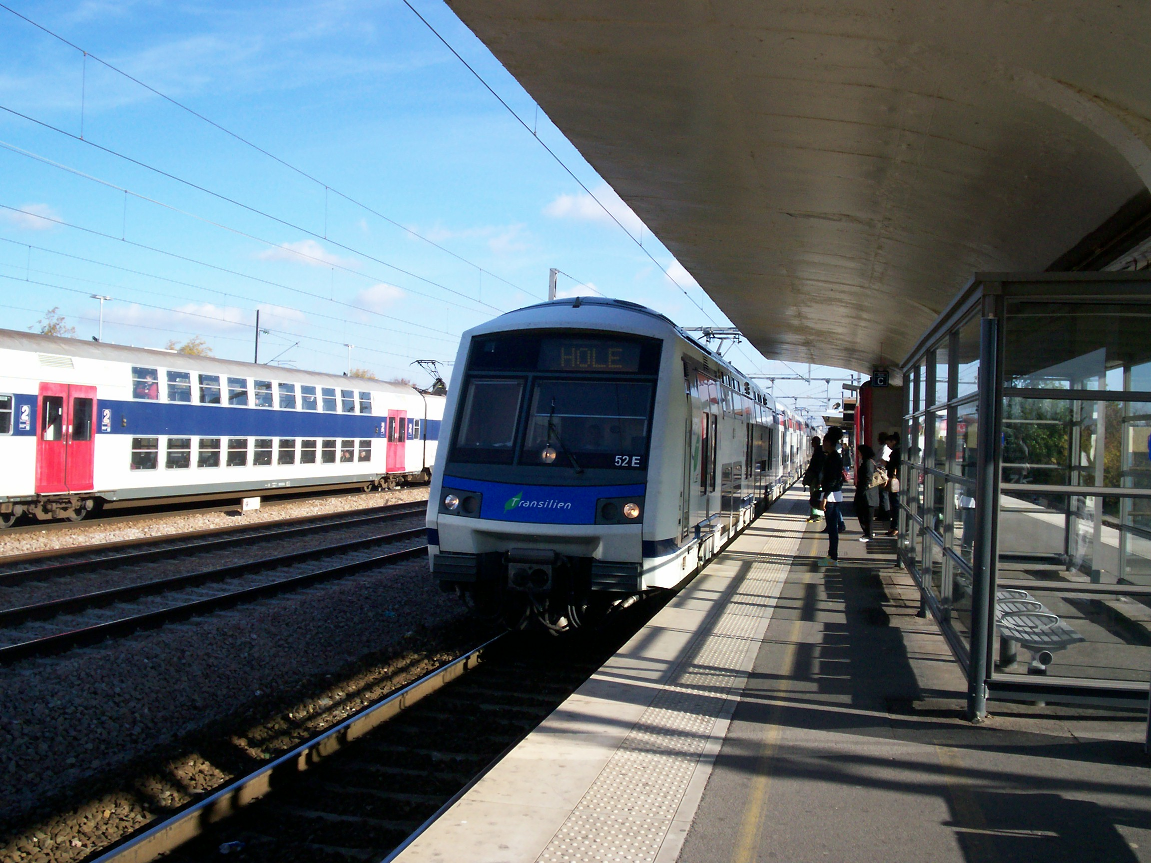 RER E - Gare de Chelles-Gournay